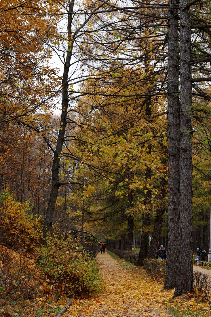 Парк "Сокольники", Восточный округ This image is related to the protected area of Russia number 7710274